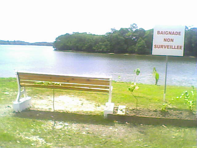 Au bord du fleuve de Montsinéry-Tonnégrande, la baignade n'est pas surveillée.